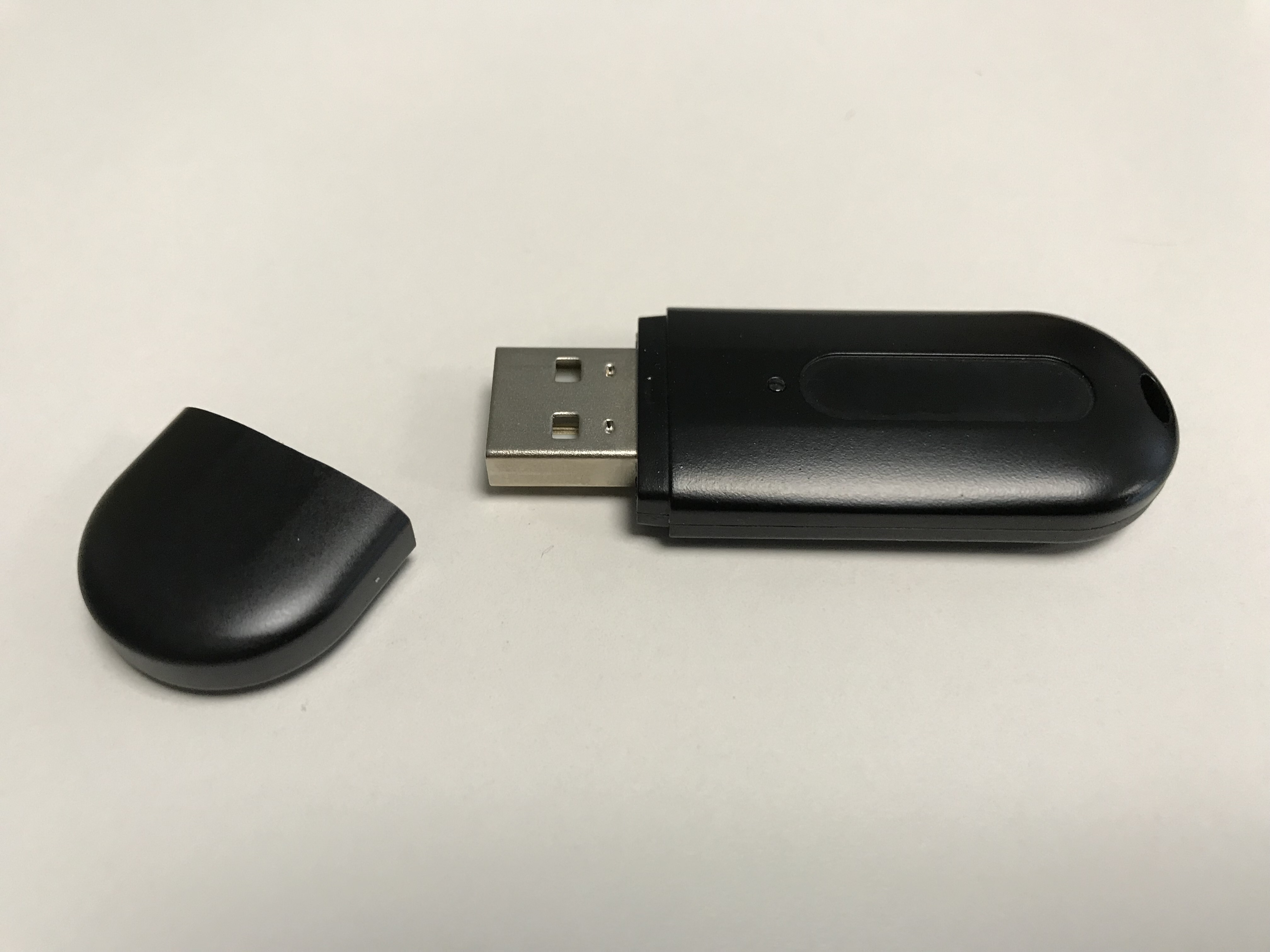 Συσκευή USB Token Oberthur